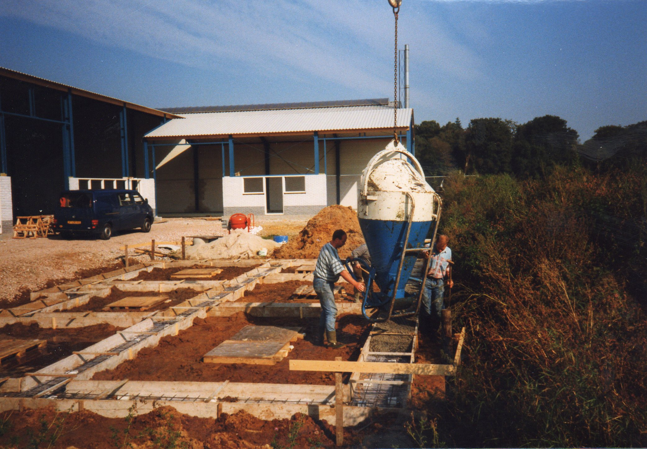 Betonstort met een kubel tbv een fundering van een nieuwbouwhuis. Zichtbaar is onder meer het bekistingswerk voor de funderingsbalk met de wapening en pielmannetjes (houten afstandhouders in de vorm van latten op het bekistingswerk)